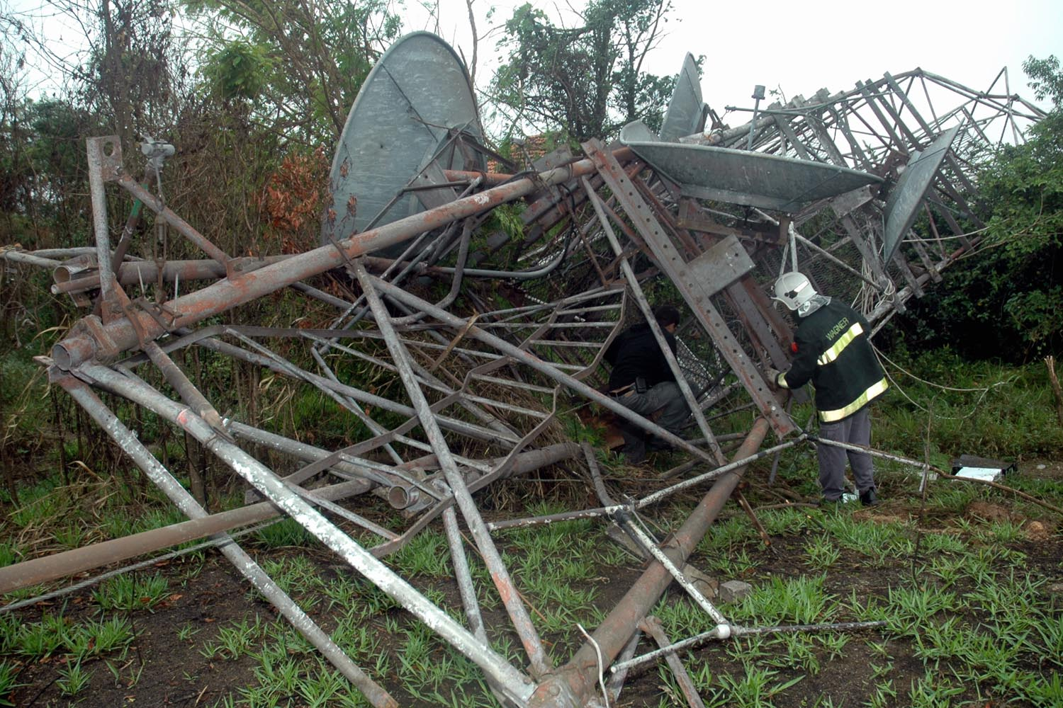 Polícia de SP